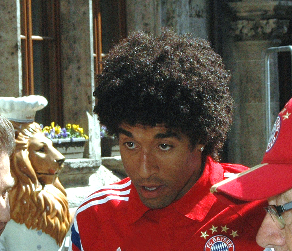 Dante Bonfim Costa Santos bei der Siegesfeier des FC-Bayern im Hof des Münchner Rathauses